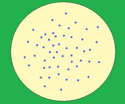 koloni biru